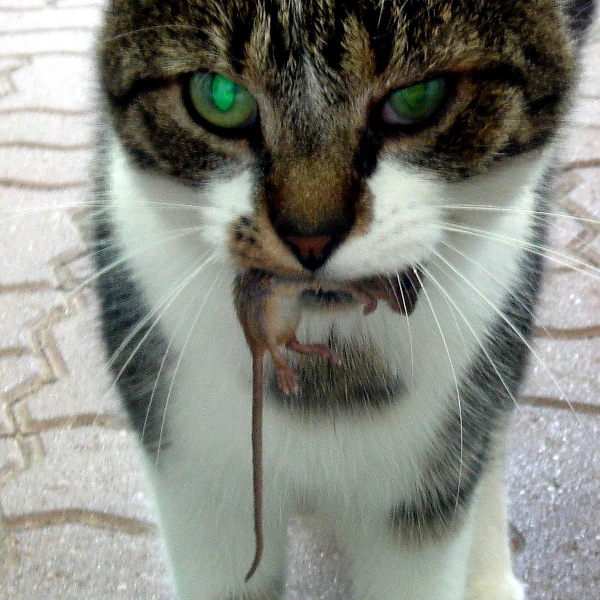 kot domowy ze swoją zdobyczą